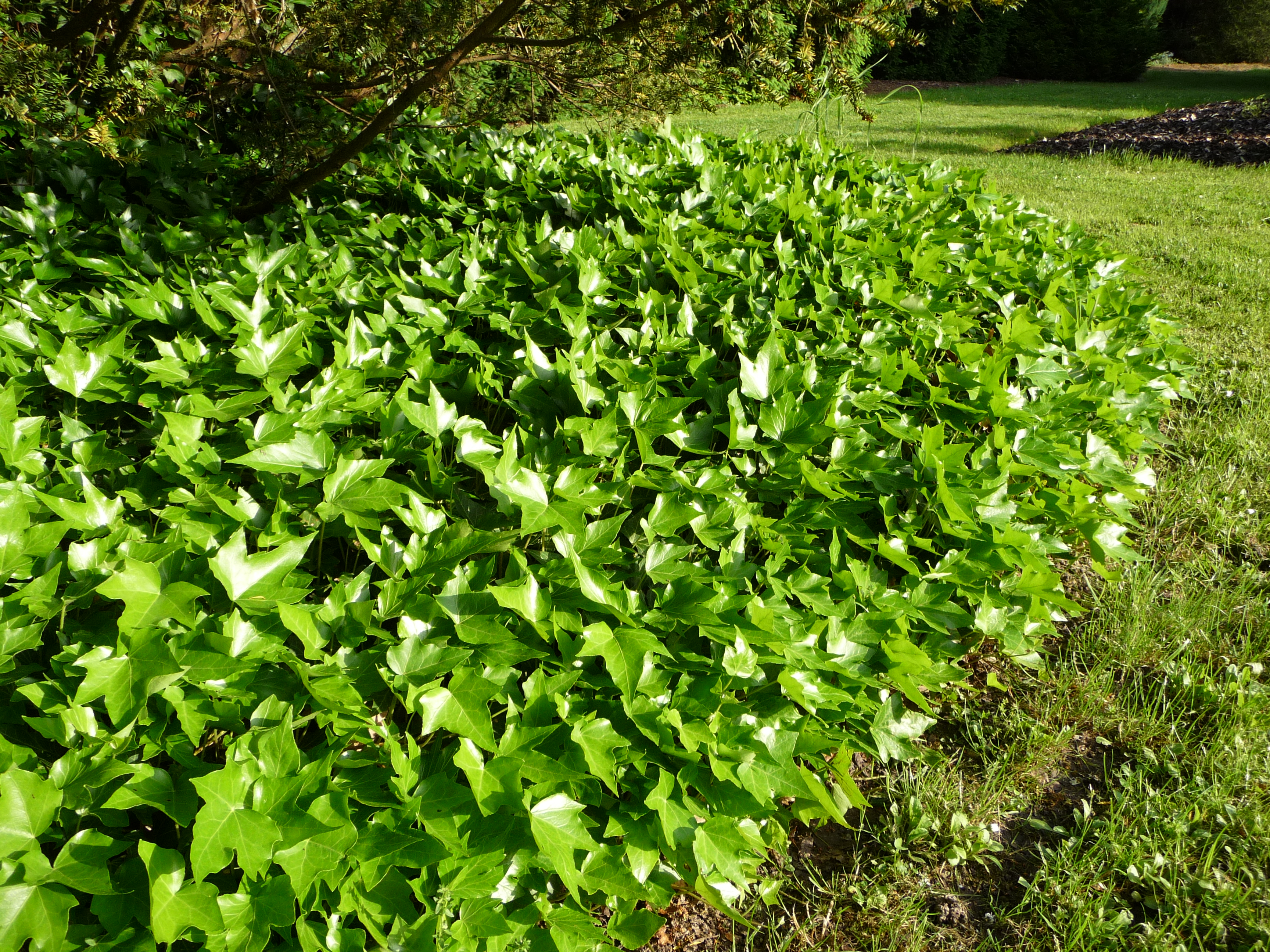 Hedera helix 'Green Ripple'